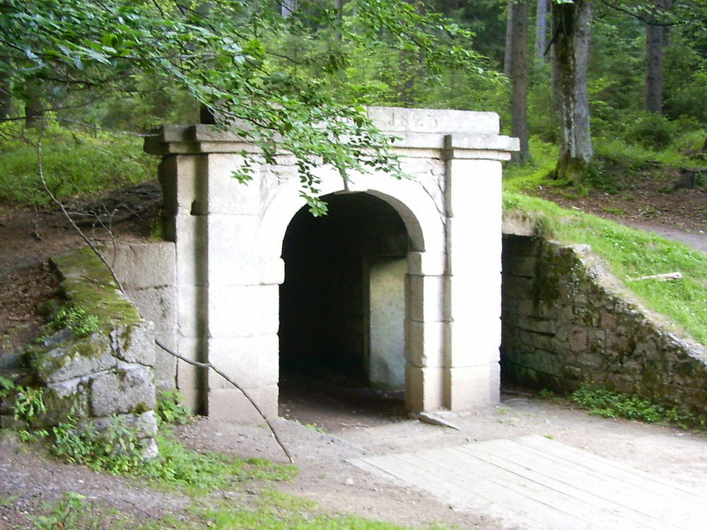 Unterer Ausgang des Kanaltunnels bei Jeleni Vrchy